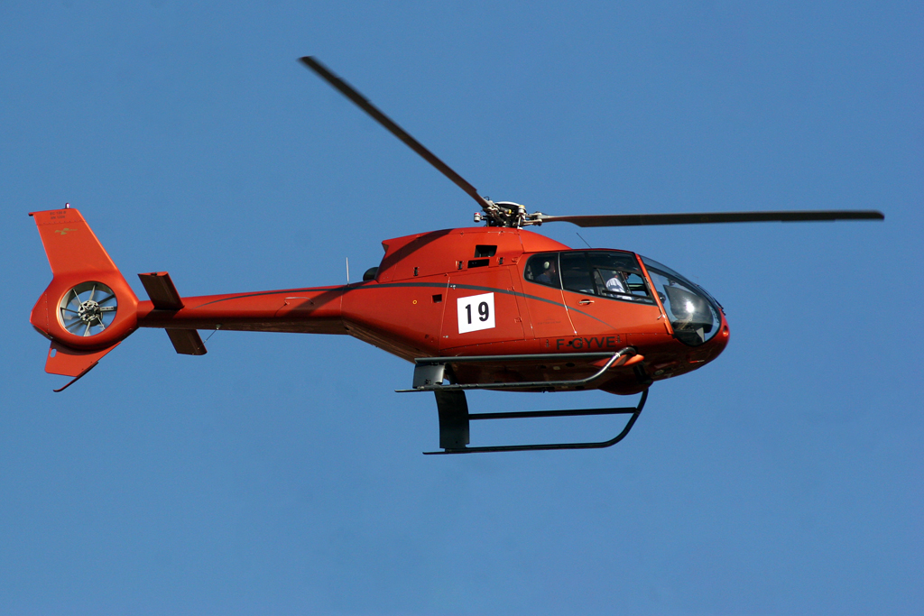 Rally Catalunya - Costa Daurada 2010